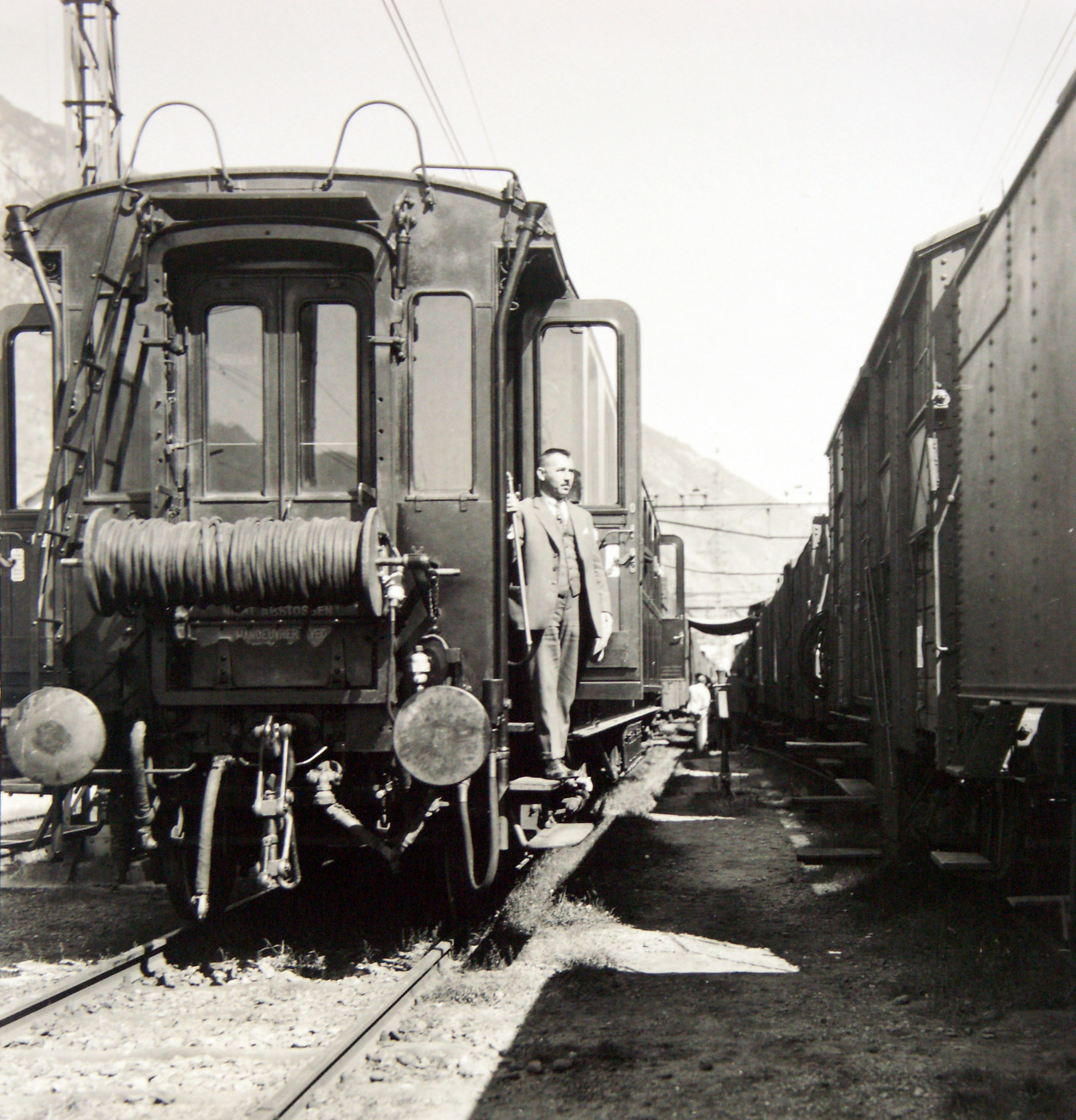 Der Erfinder Ivar Drolshammer während der Versuchsfahrten mit der Drolshammer-Bremse auf der Gotthard Südrampe